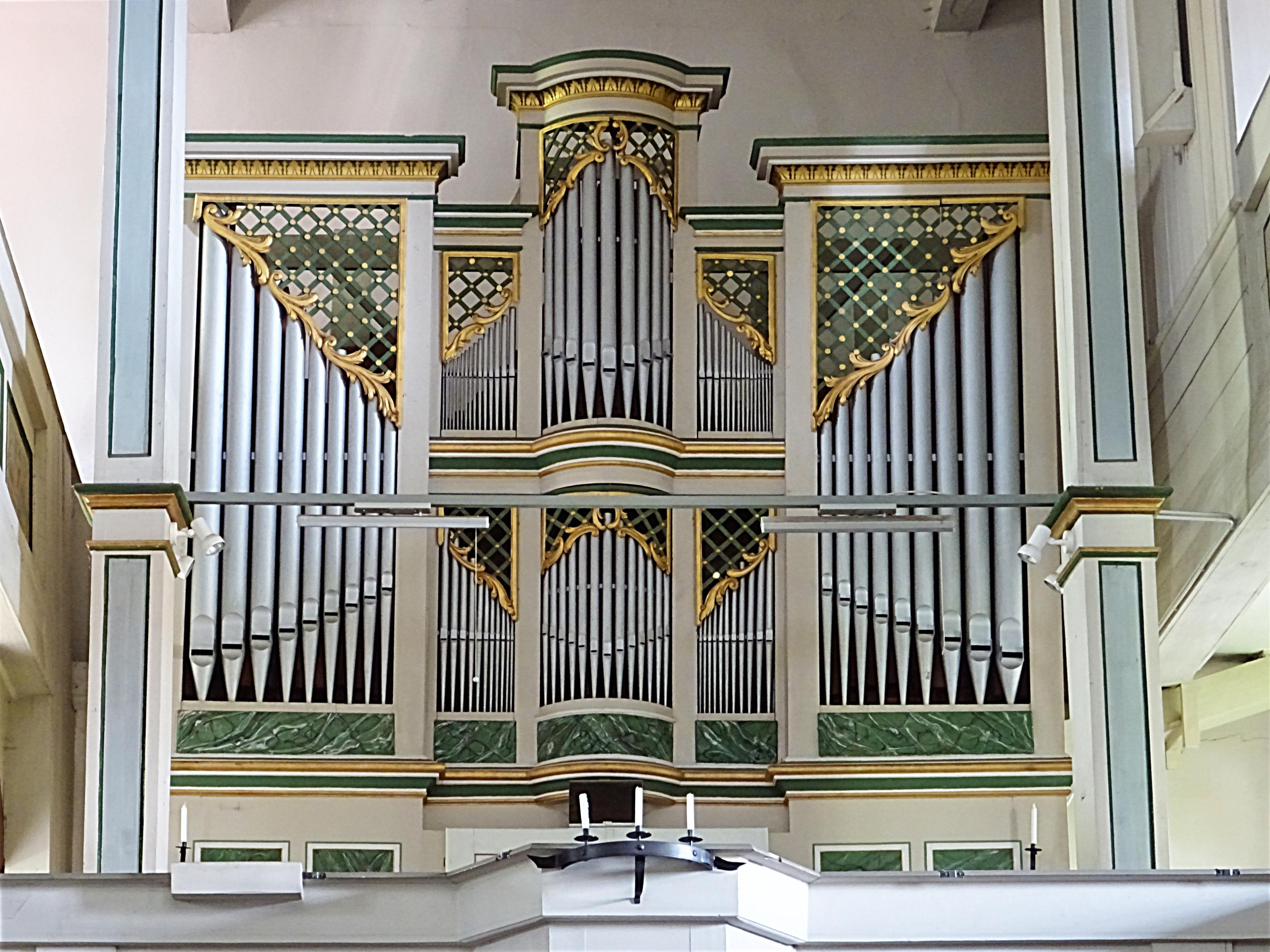 Orgel der Dorfkirche Winzerla (1818 II/P15)